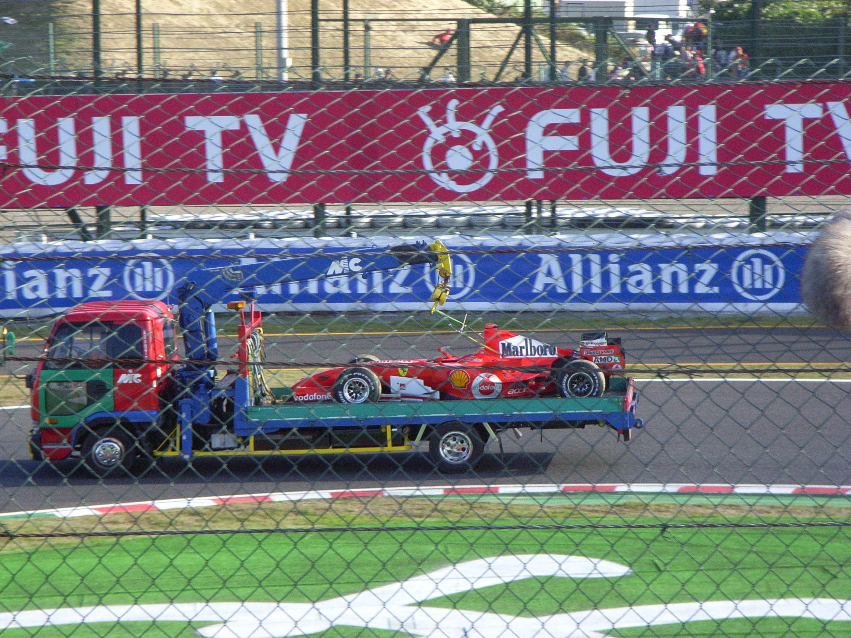 M. Schumacher car, Suzuka 2006